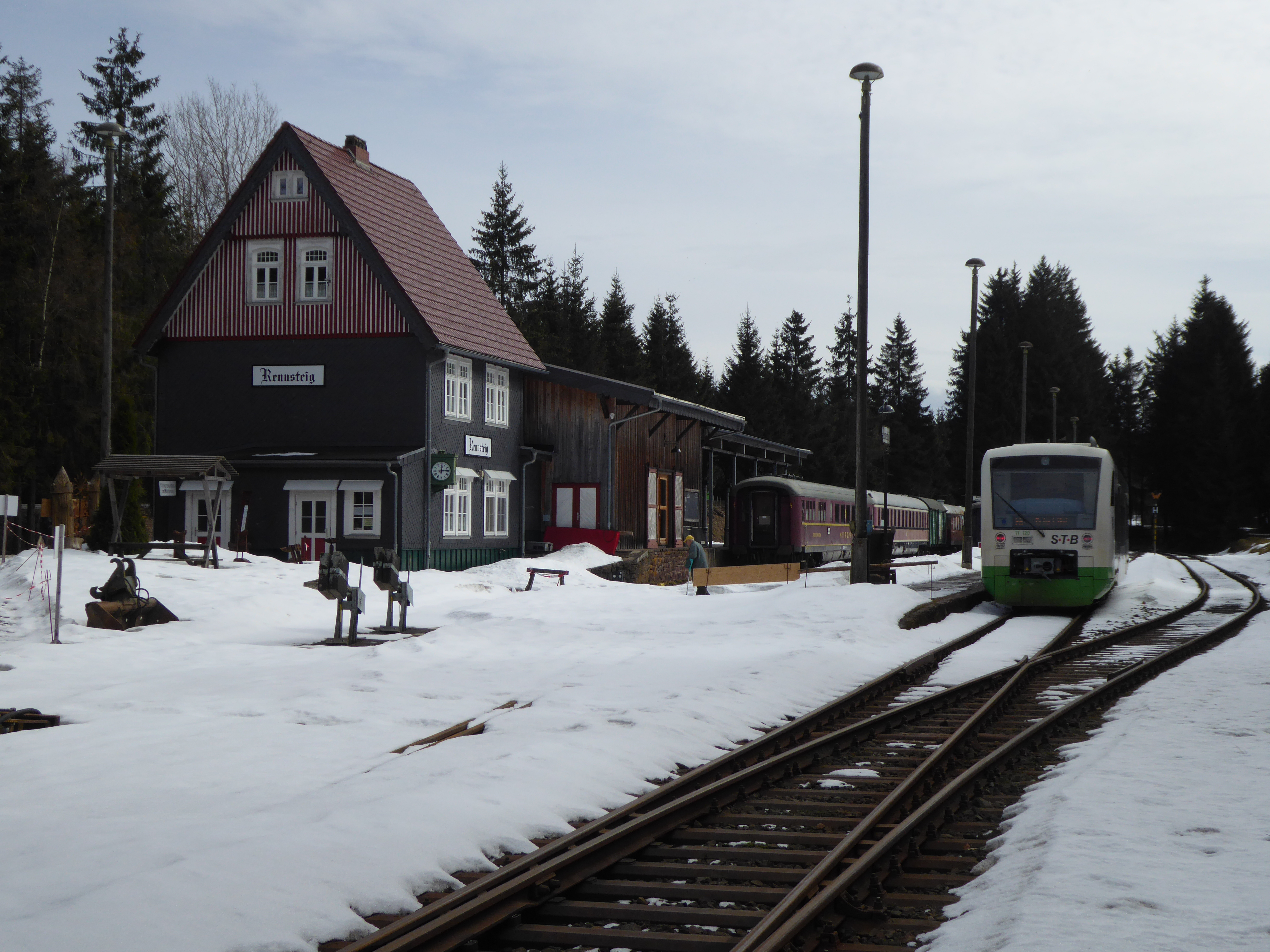 Bahnhof Rennsteig mit Rennsteigshuttle, Blick von der Bahnhofseinfahrt